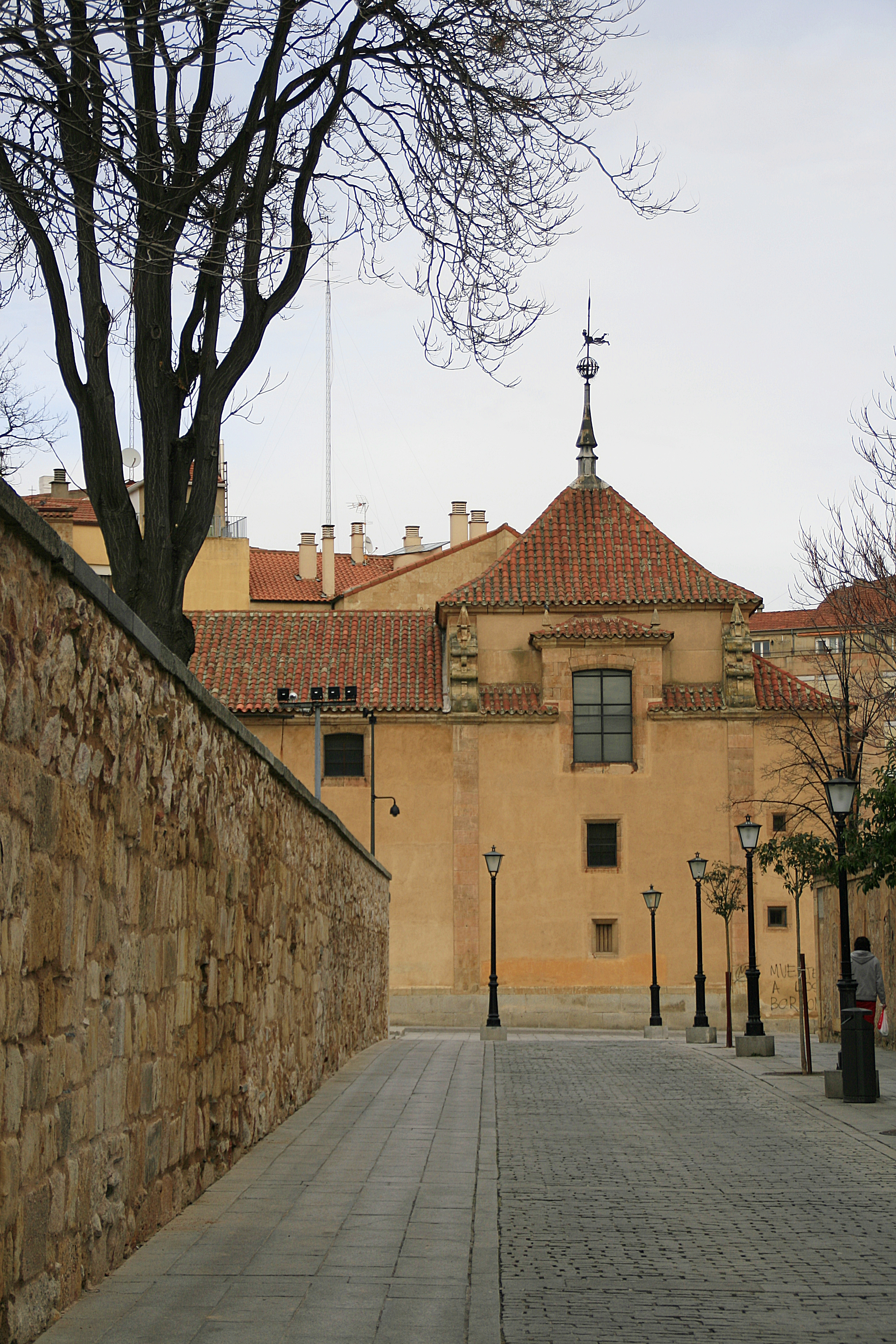 Salamanca. Capilla de la Vera Cruz desde la calle Domínguez Berrueta.